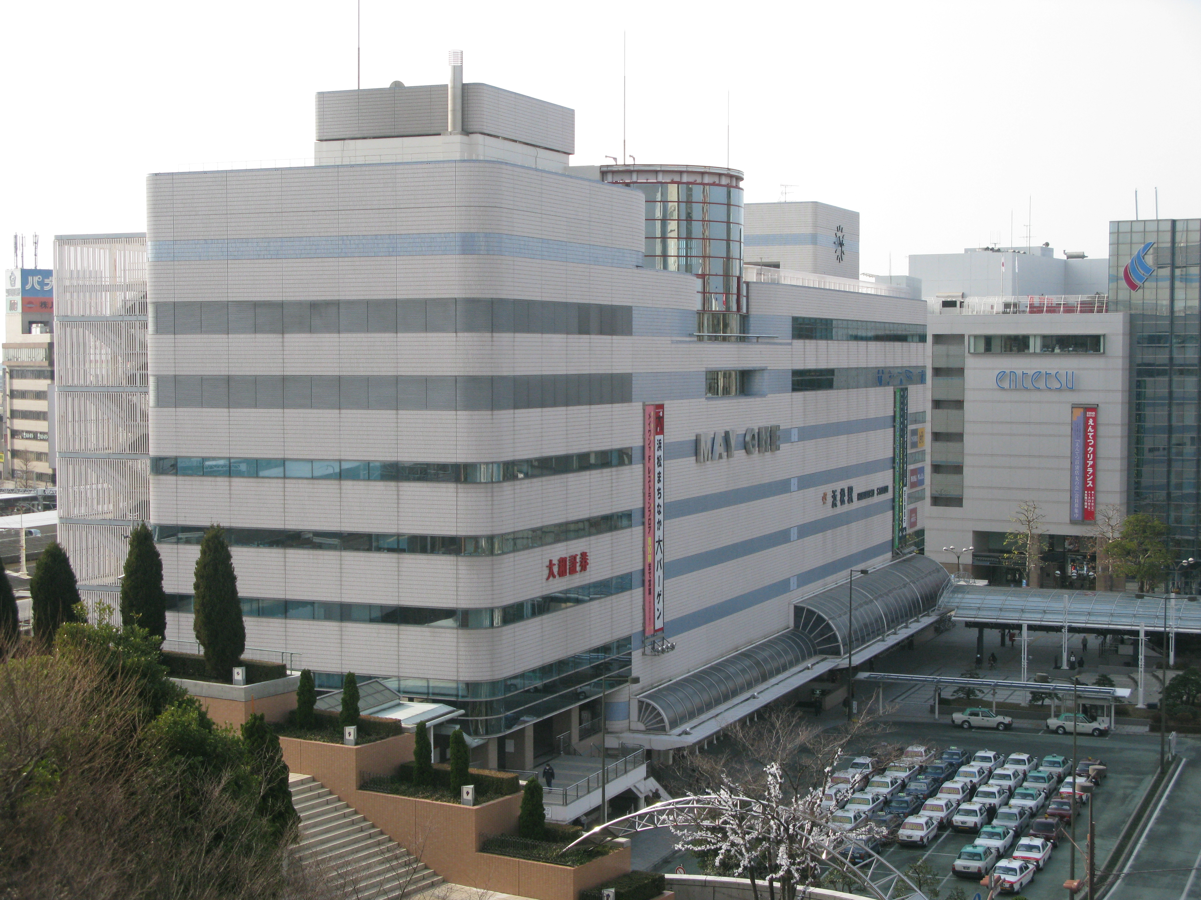 Hamamatsu station